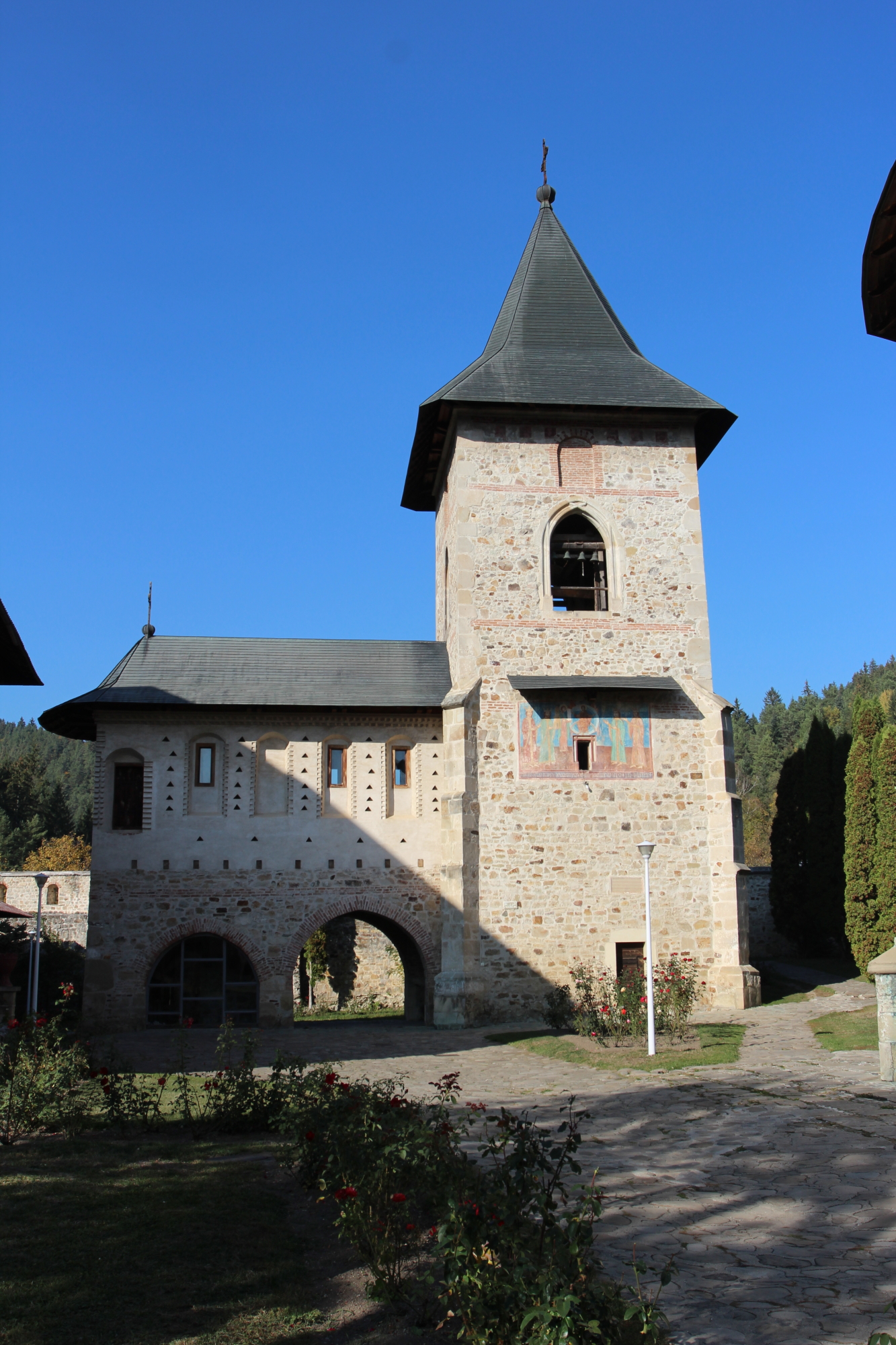 Turn clopotniță cu Paraclisul "Sf. Ioan cel Nou" 02